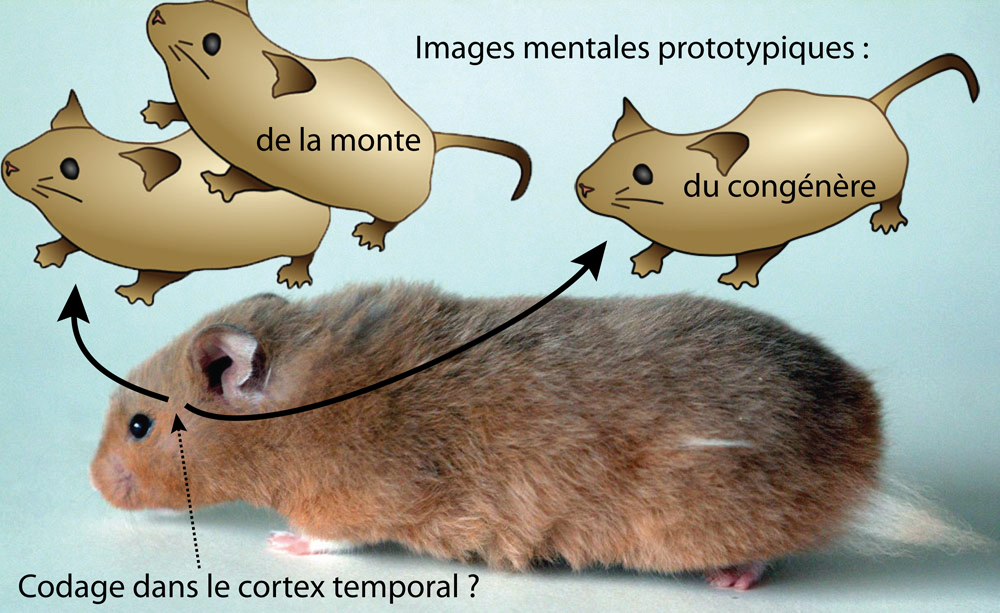 Existe-t-il des images mentales, simplifiées et prototypiques, qui seraient codées et précablées dans des régions corticales spécialisées (comme le cortex temporal inférieur, qui est spécialisé dans le traitement cognitif des formes) ? Ces images prototypiques permettraient de contrôler de manière innée les comportements (dans l'exemple ci-dessus, deux images prototypiques indiqueraient au mâle les caractéristiques du congénère femelle et la position de la monte, informations qui lui permettraient de copuler). Mais comment ces images prototypiques, complexes, pourraient-elles être codées dans des régions corticales connues pour être le siège de phénomènes de plasticité, de stabilisation sélective et de réorganisation ? Comment pourrait-on expliquer le contrôle génétique du précablage spécifique et précis des millions d'interconnexions synaptiques vraisemblablement nécessaires au codage de ces formes complexes ?